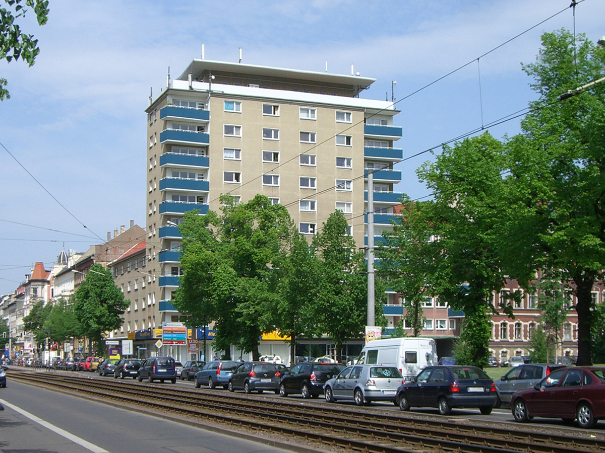 Das Hochhaus an der Karl-Liebknecht-Straße in der Leipziger Südvorstadt